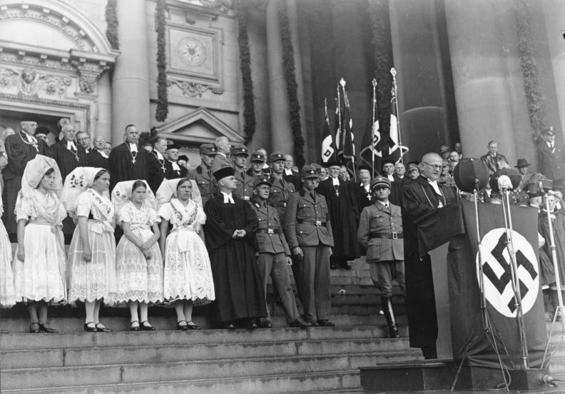 Die feierliche Einführung des Reichsbischof Ludwig Müller im Dom zu Berlin! Der Reichsbischof Ludwig Müller am Rednerpult während seiner Ansprache an die Gemeinde der Deutschen Christen vor dem Berliner Dom. Information added by Wikimedia users.